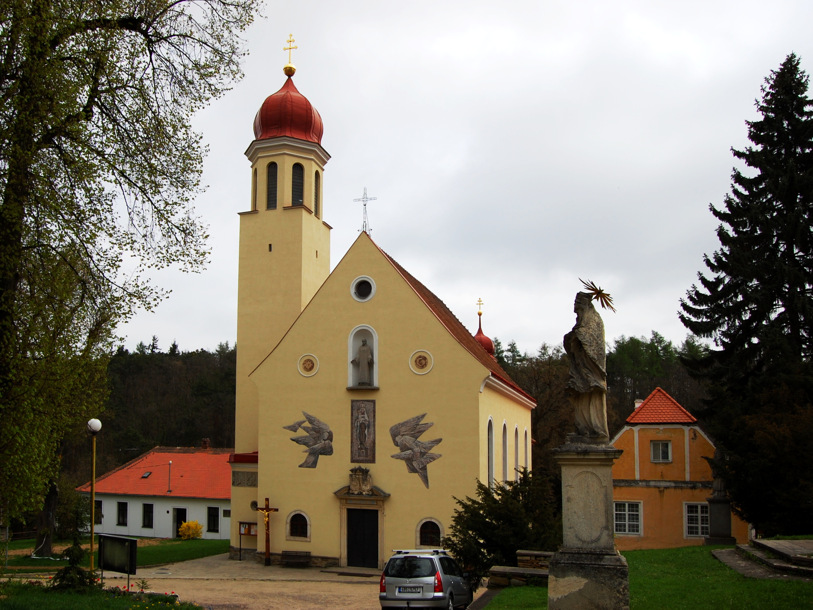 Kostel Navštívení Panny Marie (Hluboké Mašůvky), Hluboké Mašůvky